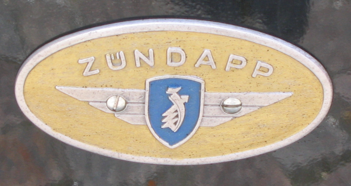 aufgenommen während eines Oldtimer-Treffens im Emmendingen, Deutschland